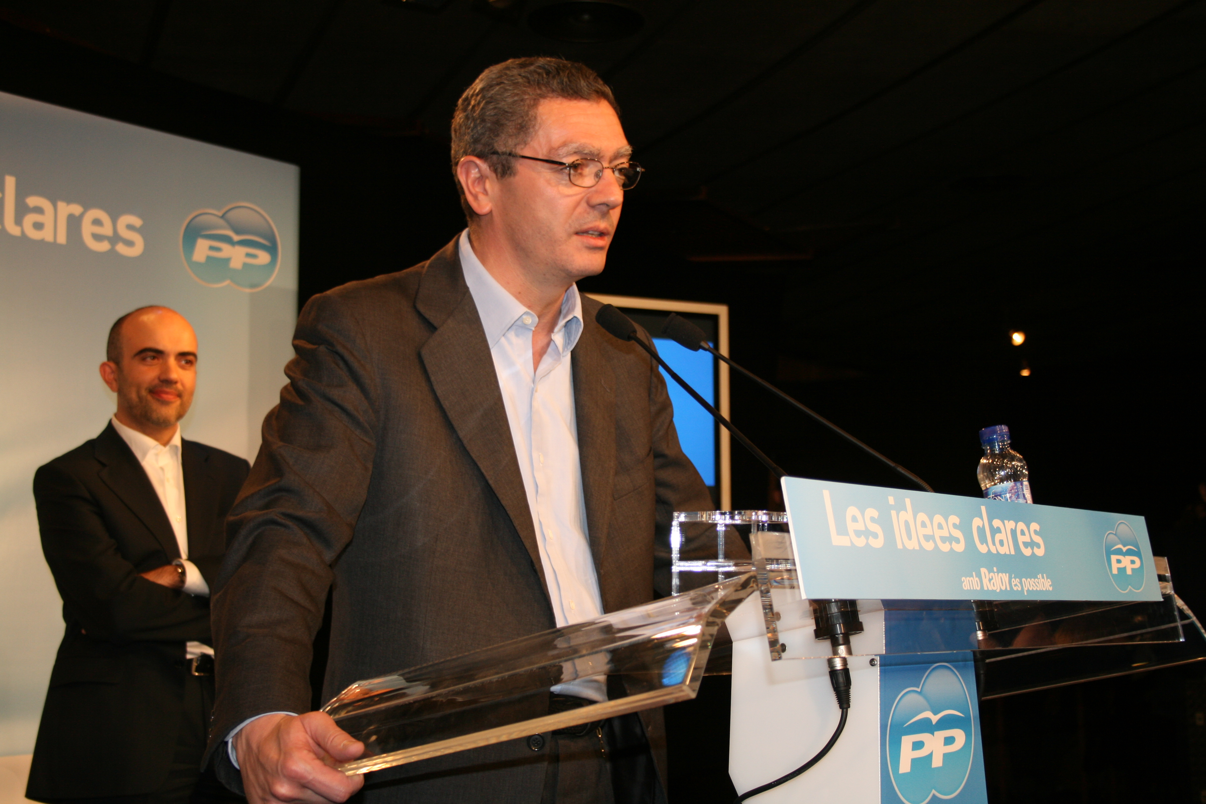 Alberto Ruiz Gallardón en el inicio de campaña de las Elecciones Generales 2008